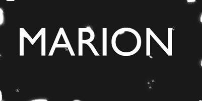 logo de la banda marion